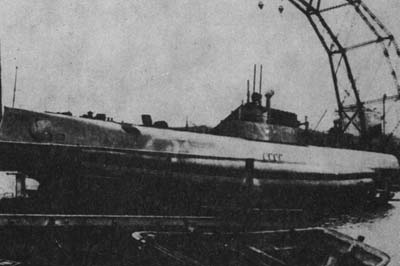 Подводная лодка "Краб"